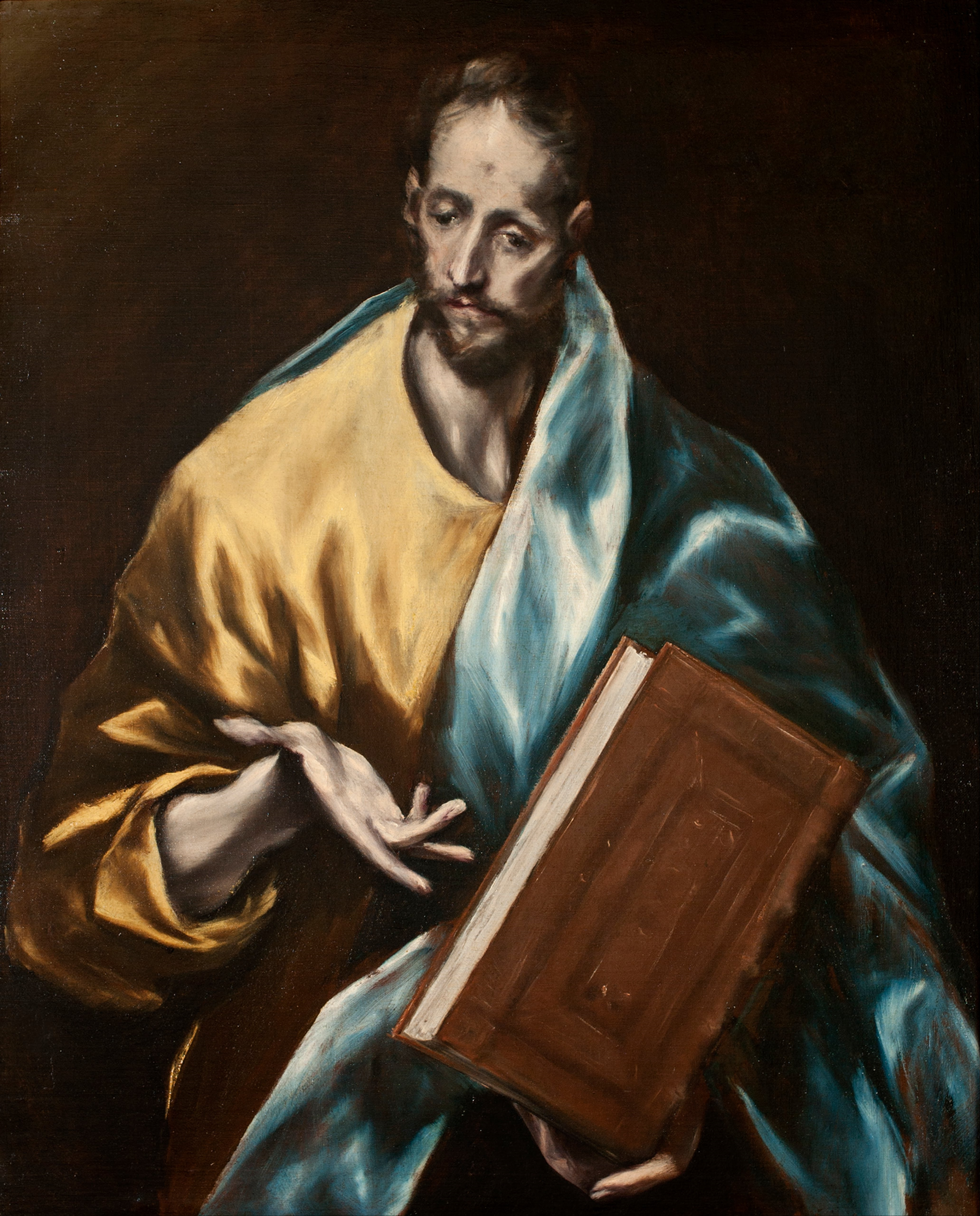 La obra representa a Santiago el Menor, uno de los doce apóstoles de Jesucristo.